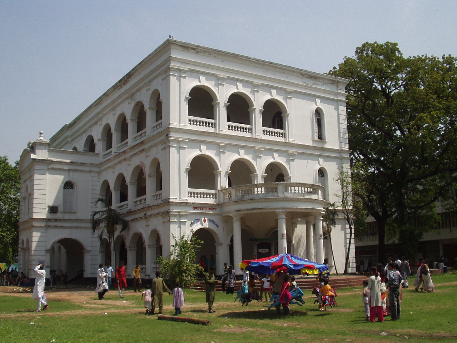 Bangla academy building, during Boi Mela 2006. --mamun2a